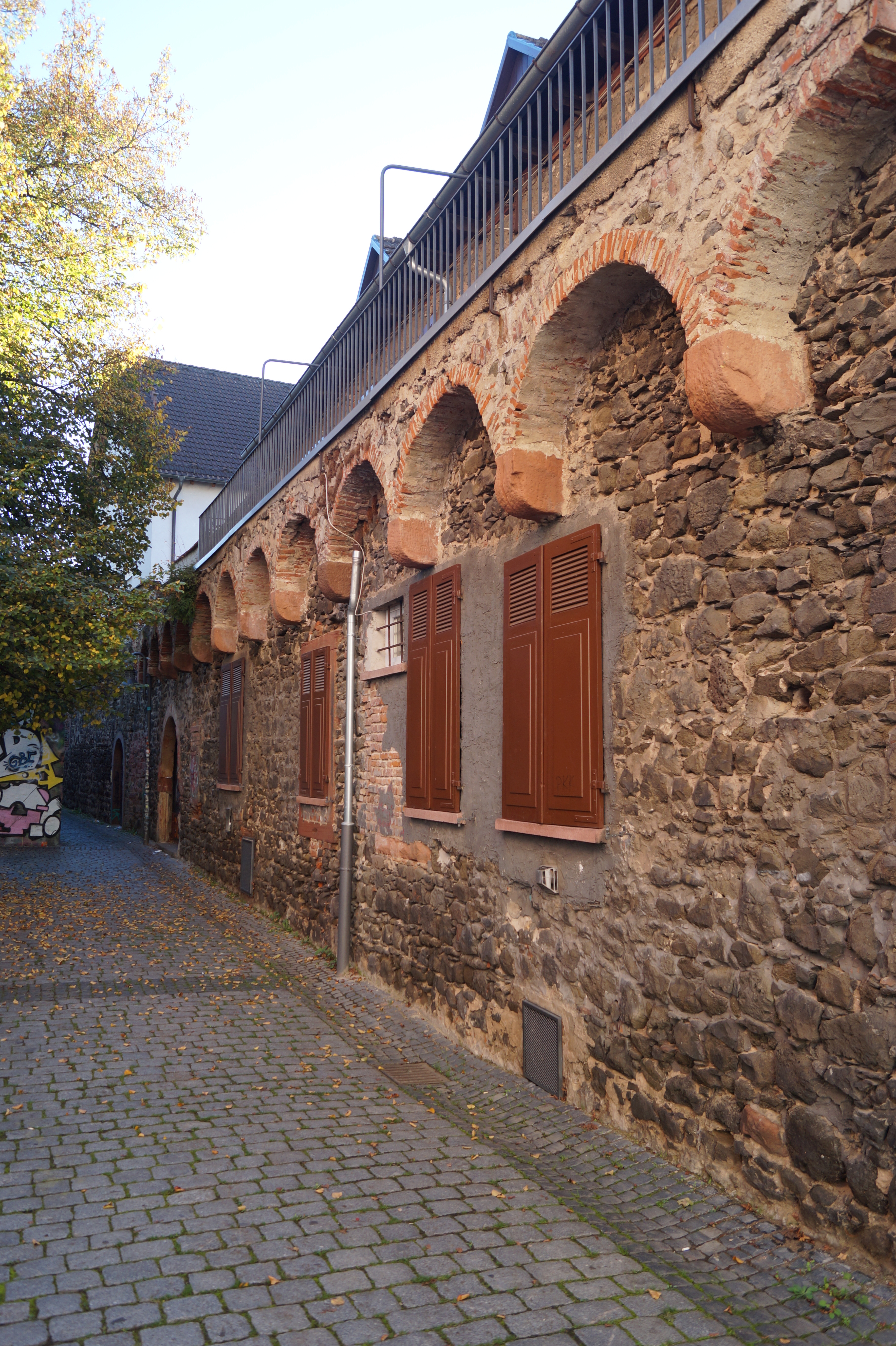 Rest der mittelalterlichen Stadtbefestigung der Altstadt Hanau in der Schlendergasse.